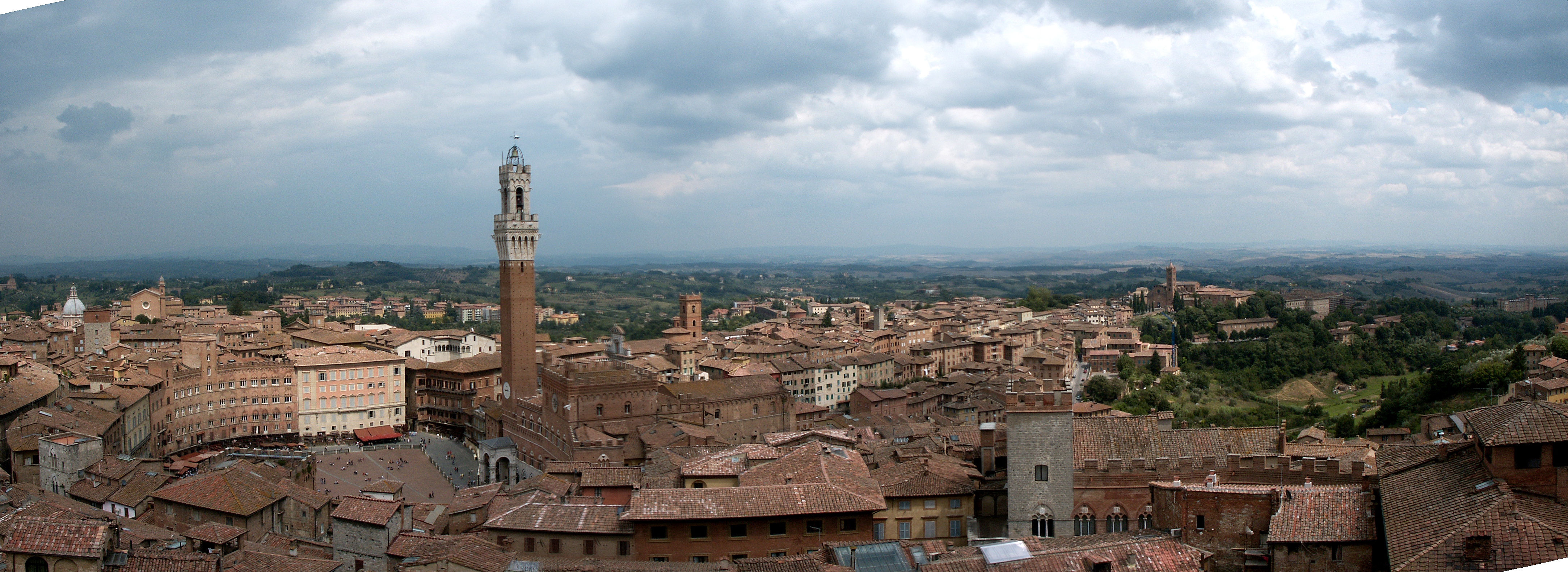 Panoramique de Sienne - Italie